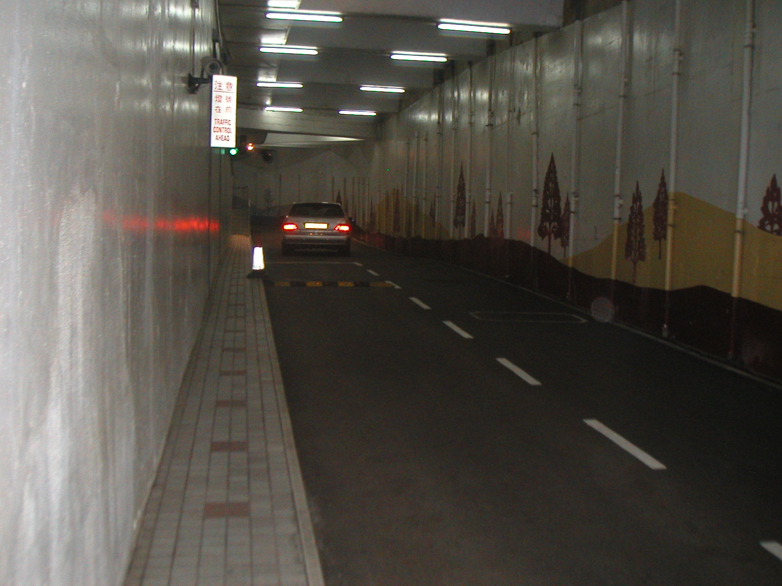 龍園的停車場出入口 粵語: 龍園嘅停車場出入口